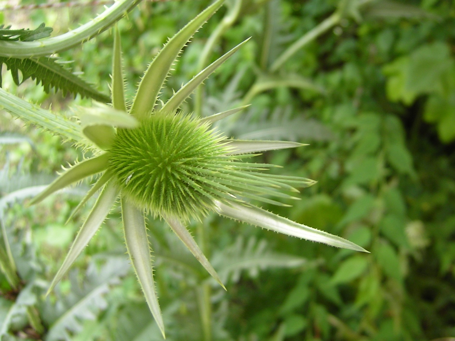 (en) Dipsacus laciniatus Place: Switzerland, SG Editing: cut (GIMP ) (de) Kopf einer Schlitzblatt-Karde (Dipsacus laciniatus) Aufnahmeort: Schweiz, SG (im Garten) Bearbeitung: GIMP Zugeschnitten